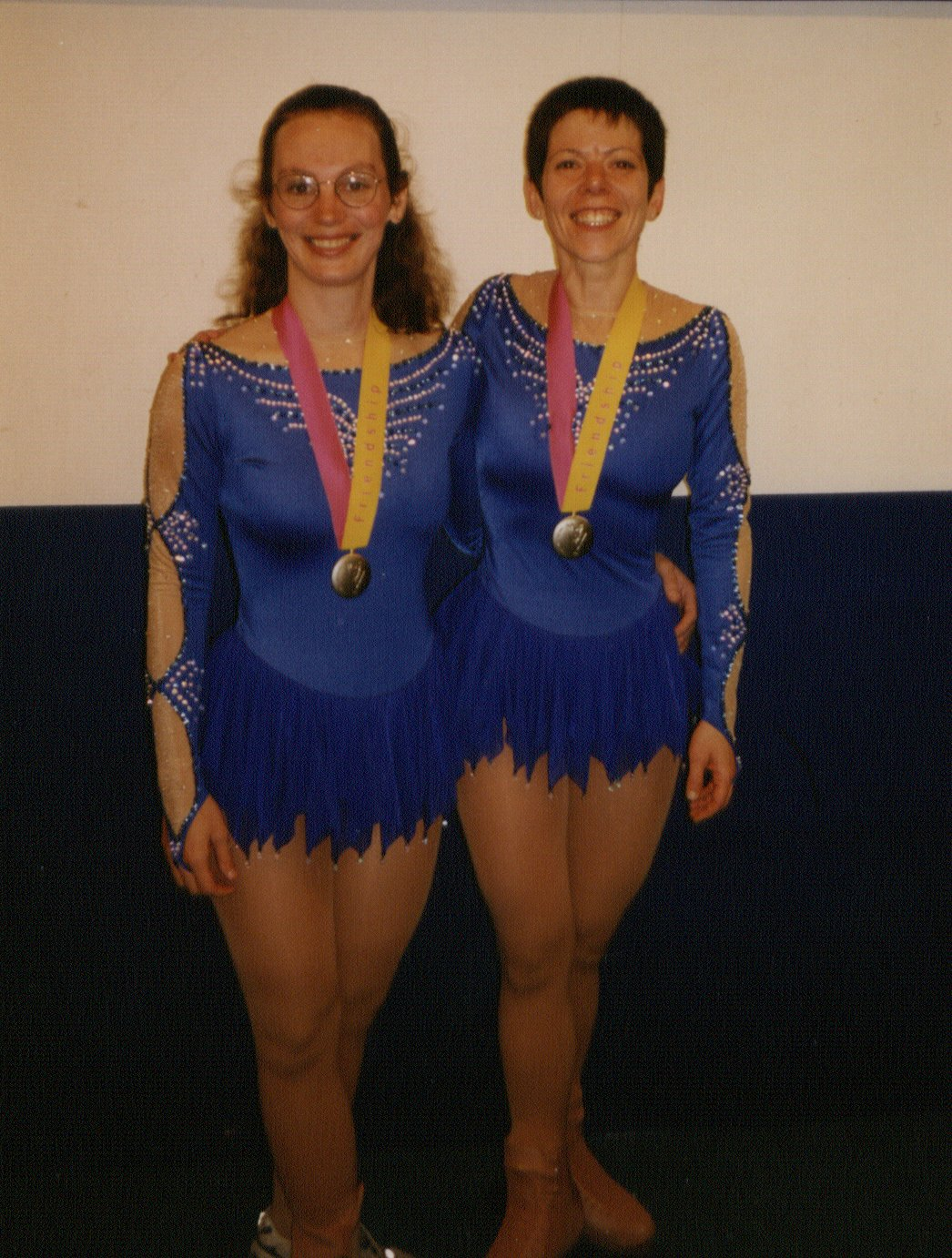 זוג מחליקות על הקרח לאחר זכייתן במדלייה במשחקים הגאים, 1998